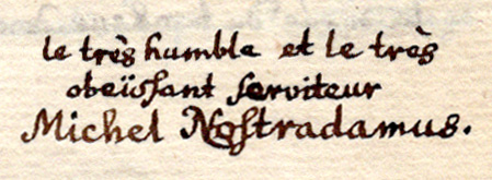 Unterschrift Gottfried Christian Freieslebens als "Michel Nostradamus" im Widmungsexemplar von "Neue Prophezeihungen und Kalenderpraktik auf die nächstkommenden hundert Jahre, von 1760 bis 1860" an Herzog Ernst II. von Sachsen-Gotha-Altenburg